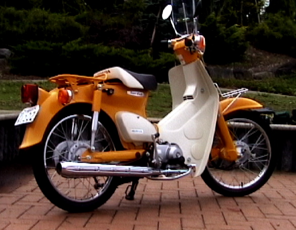 2004 Honda Supercub